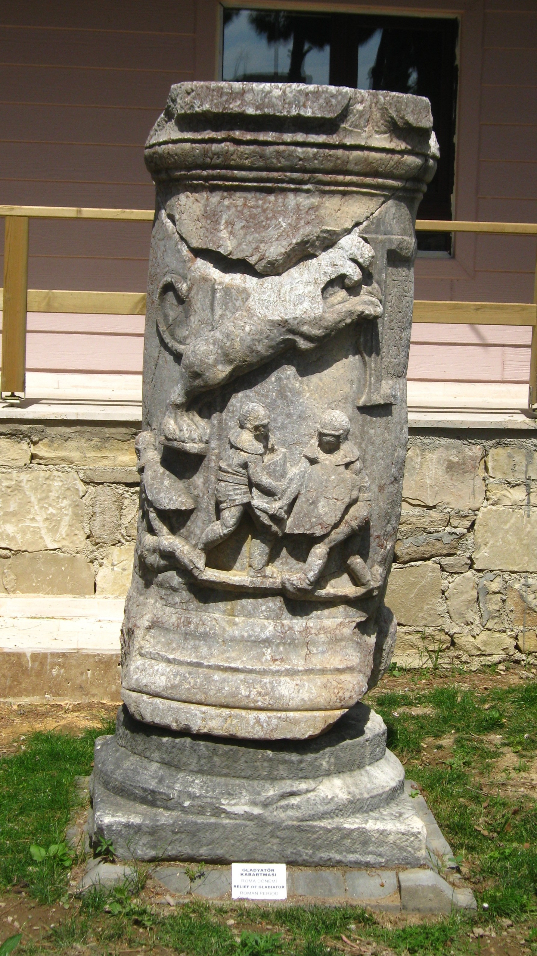 Колонна з зображенням бою гладіаторів